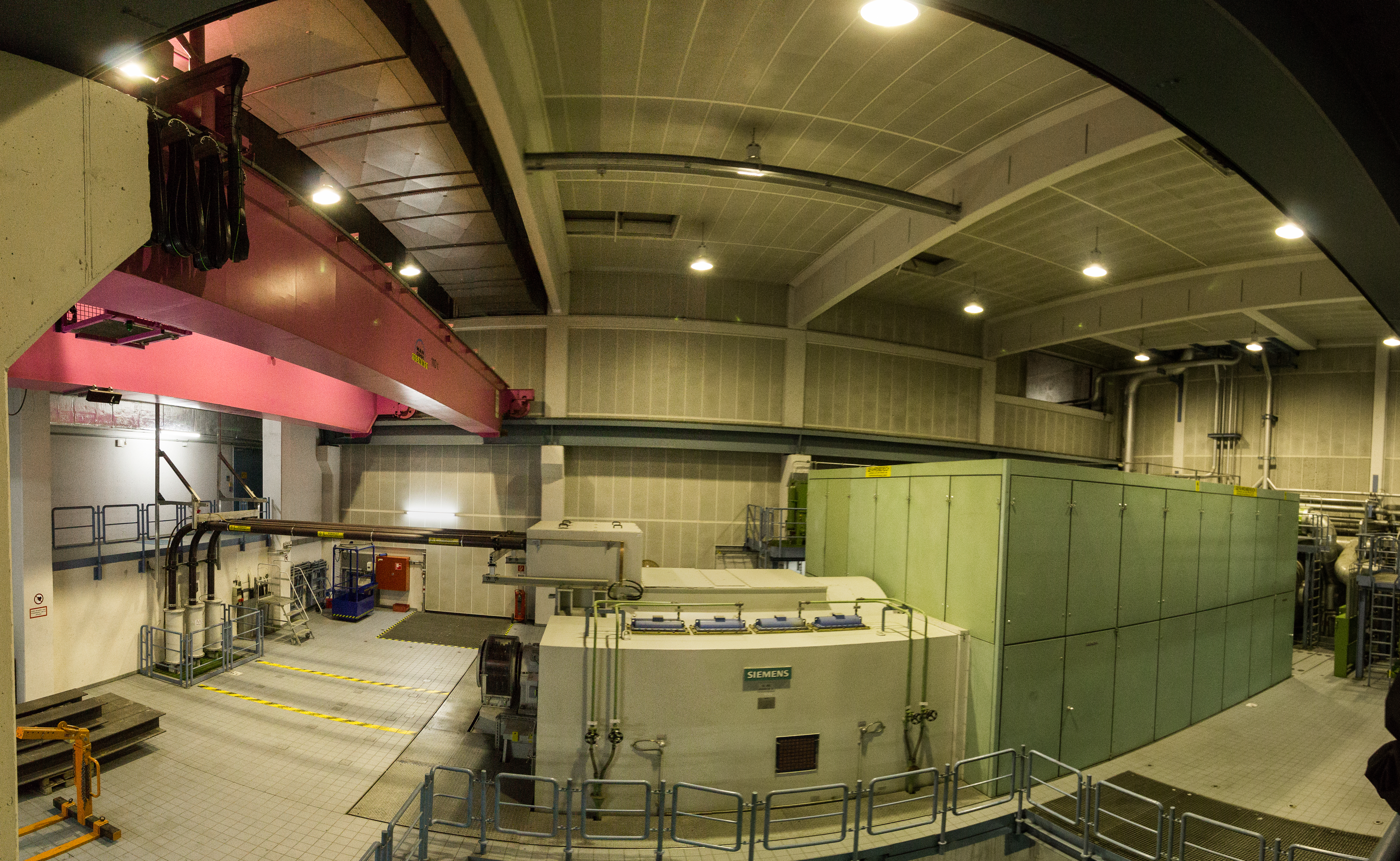 Turbinenraum Panorama - Heizkraftwerk Nossener Brücke